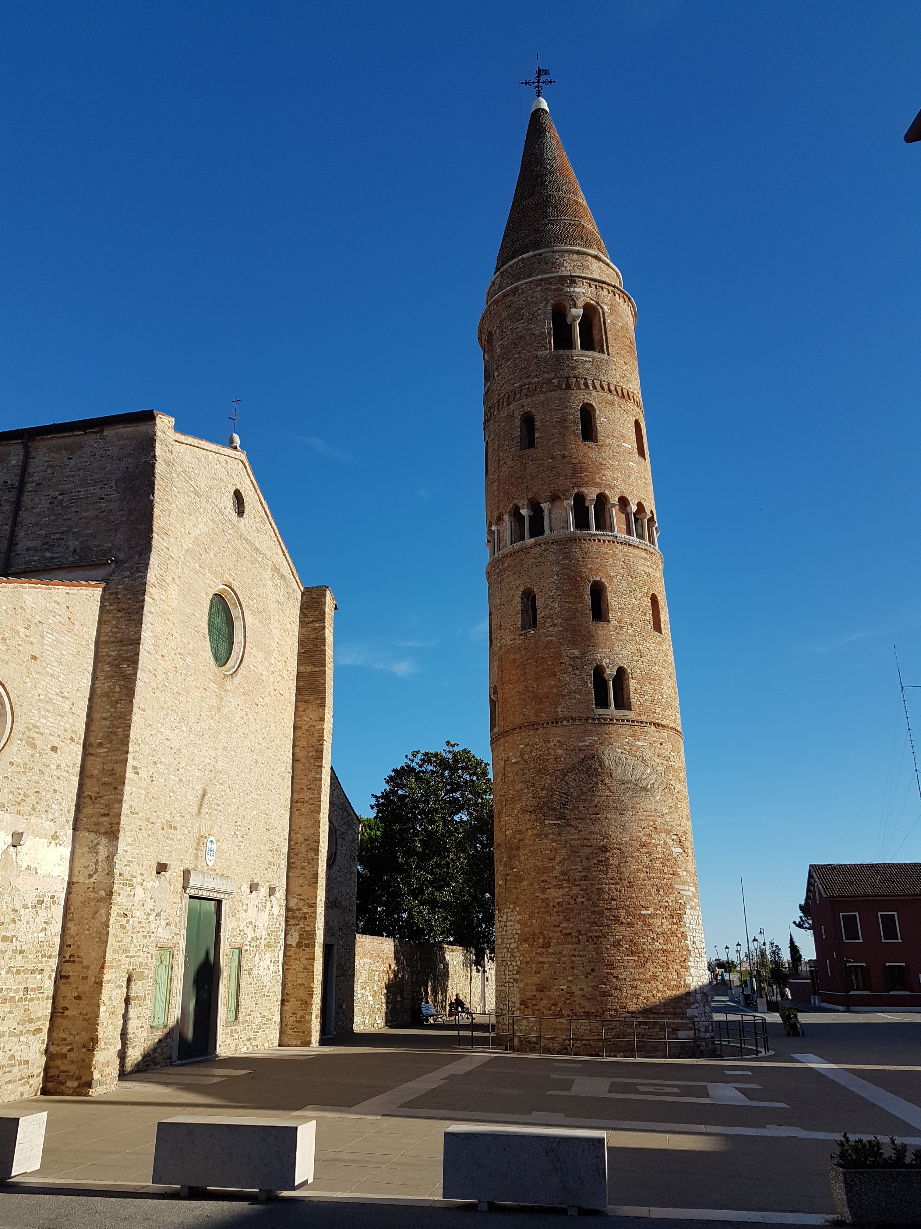 Duomo di Caorle